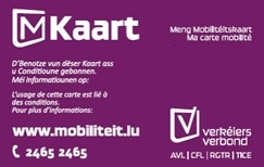 Anonym mKaart fir den ëffentlechen Transport. Déi jeweileg Ticketen ginn elektronesch op d'Kaart gelueden. Arpetan: Carte mKaart anonyme pour les transports publics. Les différents tickets sont chargés électroniquement sur la carte.